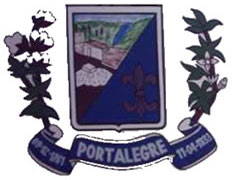 Brasão do município de Portalegre, Rio Grande do Norte, Brasil.